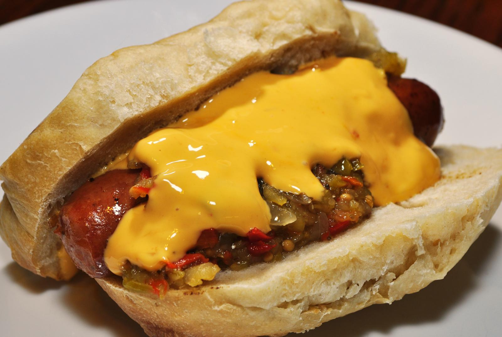 Mmm... hot dog!